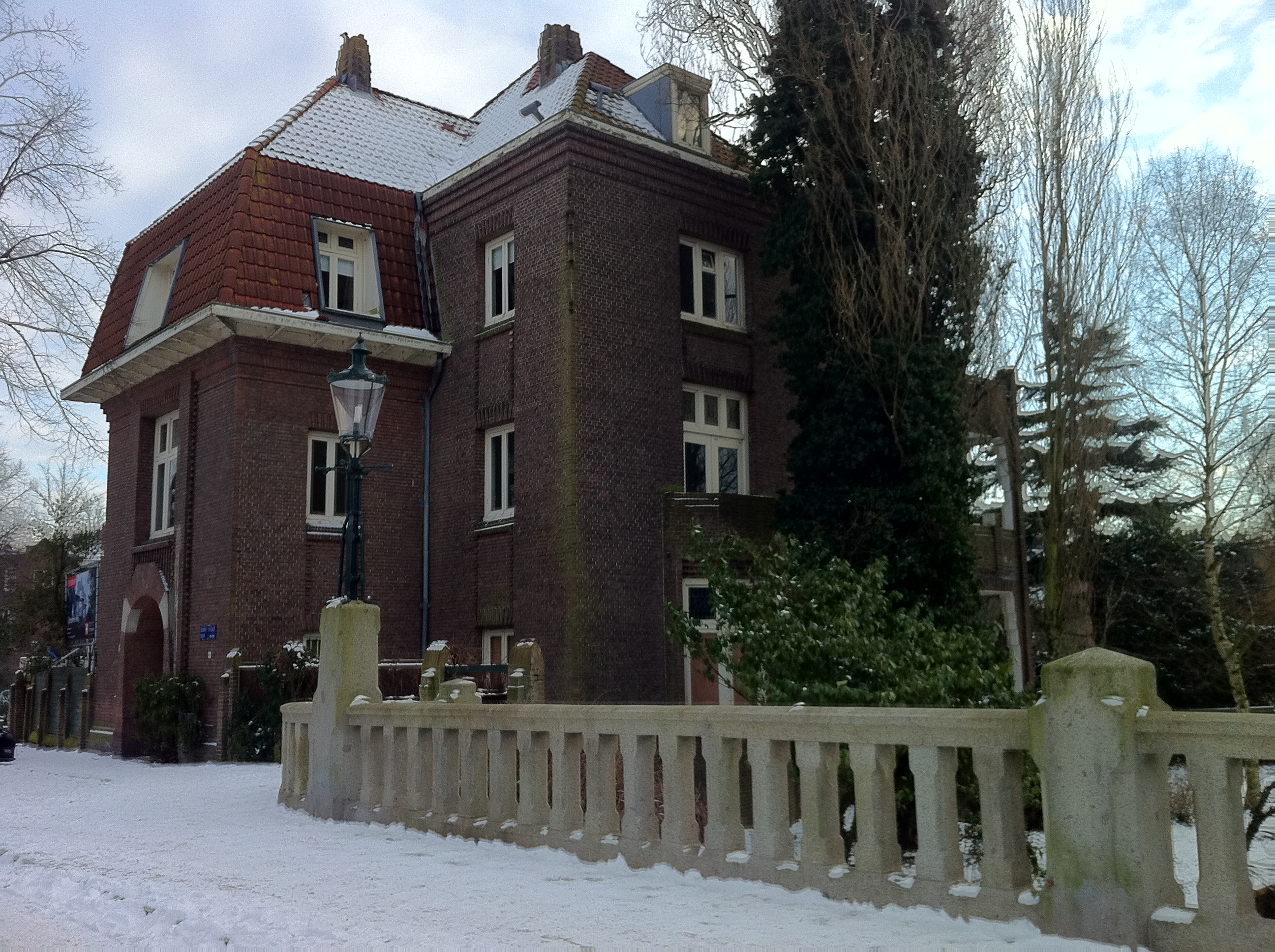 Amsterdam-Zuid, vrijstaande villa.